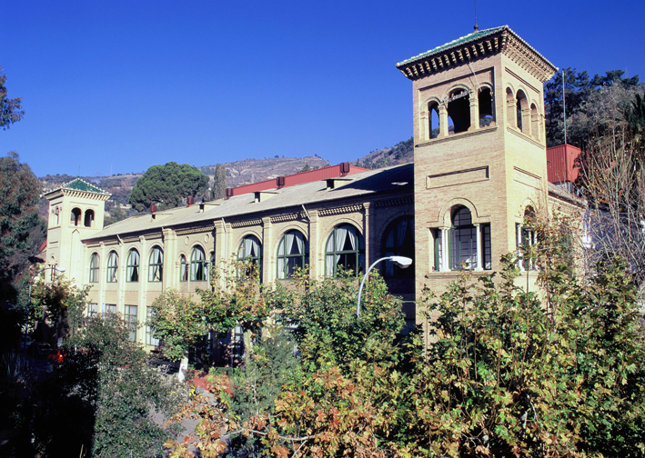 Vista desde la calle del Edificio Manantiales